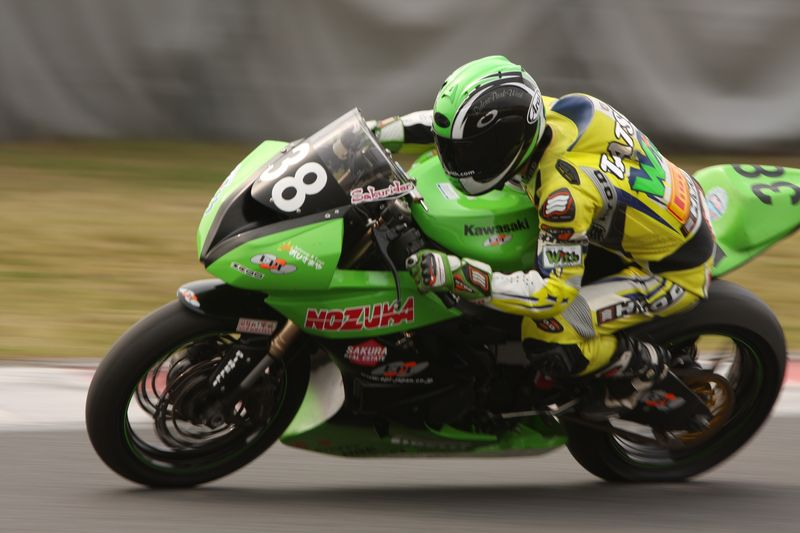 ロードレースライダー太田達也